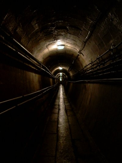 Zdjęcie przedstawia poternę (podziemny korytarz) w poniemieckiej grupie warownej Guentrange (Obergentringen) w Thionville. Autor: Zbigniew Strucki